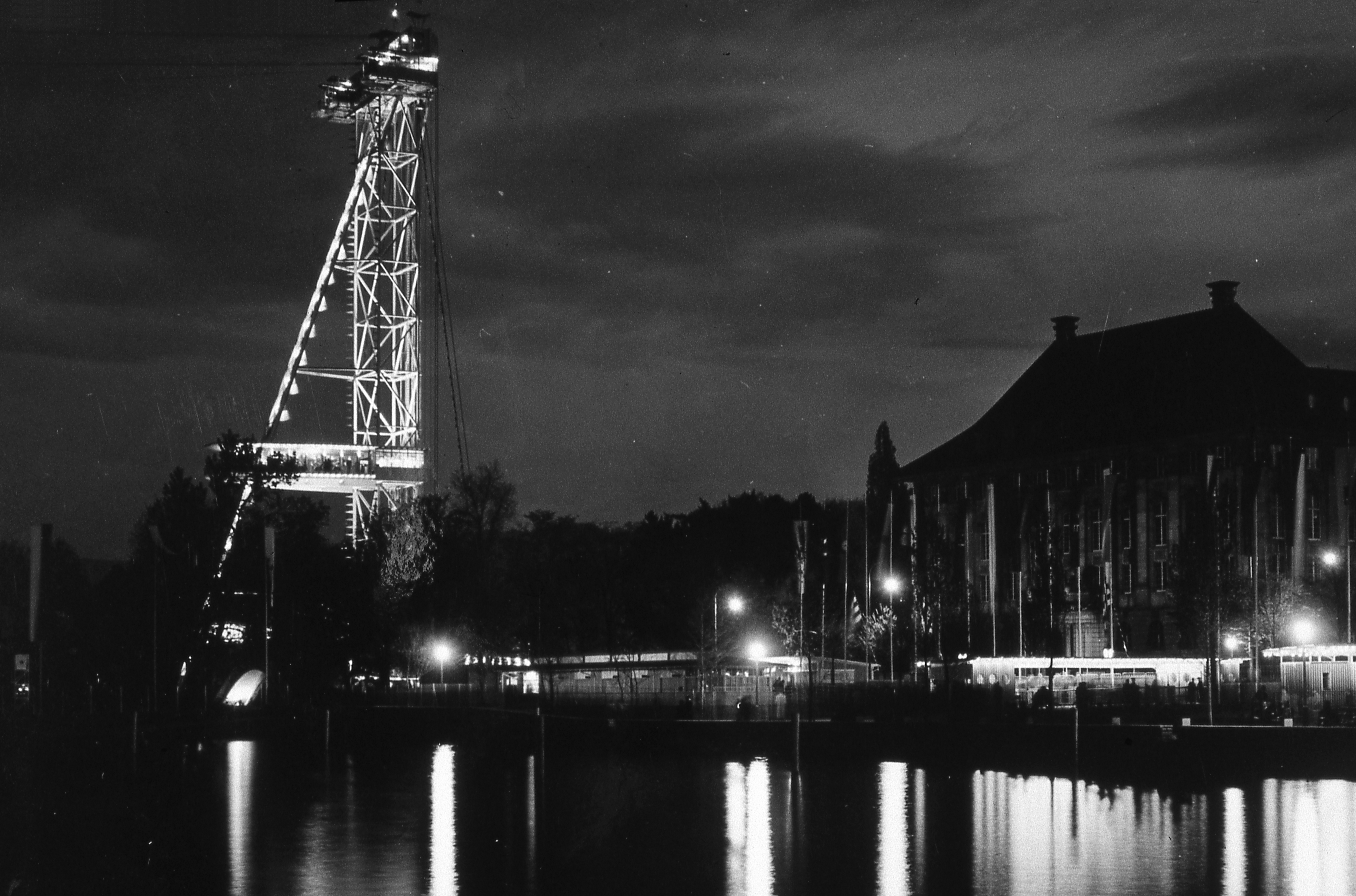 Landesausstellung 1939 in Zürich, Schweiz